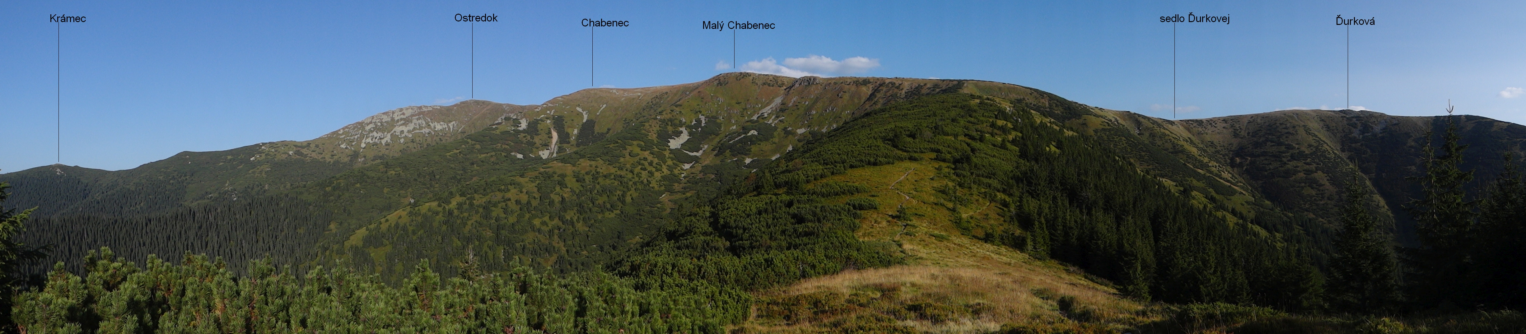 Widok z Javoriny na północne stoki i grzbiet Niżnych Tatr